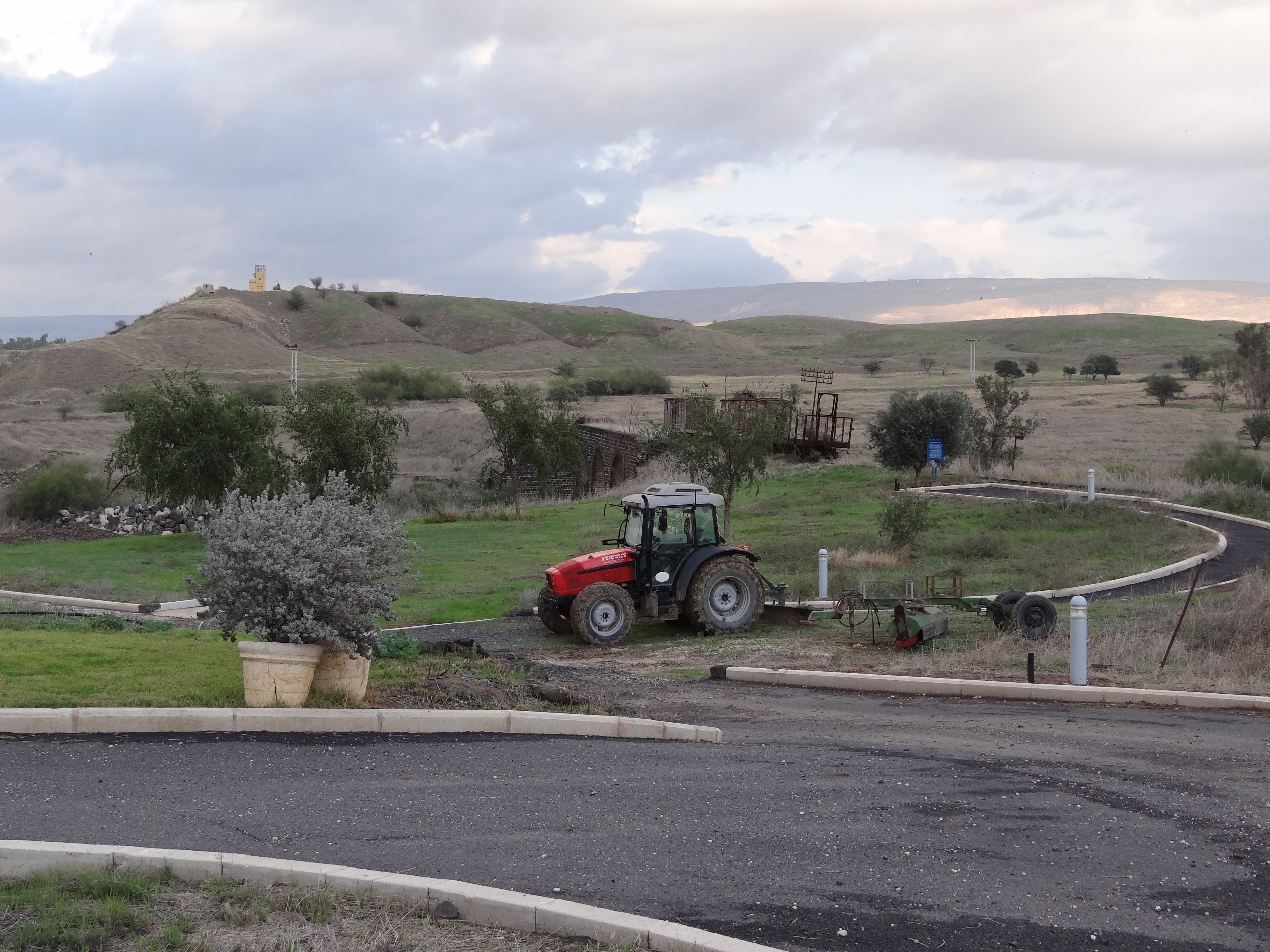 Old Gesher. In 1939 a kibbutz settle in the area. It called Gesher. The member of the kibbutz defended this palce and the police station in 1948 חצר גשר הישנה. במקום הייתה התיישבות בשנות העשרים של המאה העשרים. המתיישבים הקימו בשנת 1936 את קיבוץ אשדות יעקב. בשנת 1939 התיישבה קבוצה שהקימה את קיבות גשר. היא הגנה על המקום במלחמת העצמאות. היישוב הותקף על ידי בצבא העירקי נהרס אבל לא נכבש.